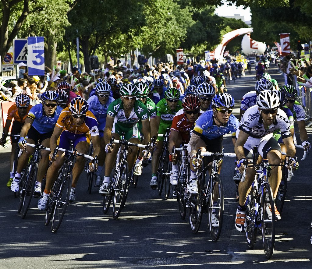 Información adicional Atribución Compartir bajo la misma licencia Algunos derechos reservados Cualquier persona puede ver esta foto * Tomada en Nimes, Languedoc-Roussillon (mapa) * Tomada con una Canon EOS 400D Digital. Más propiedades * Tomada el 18 de julio, 2008